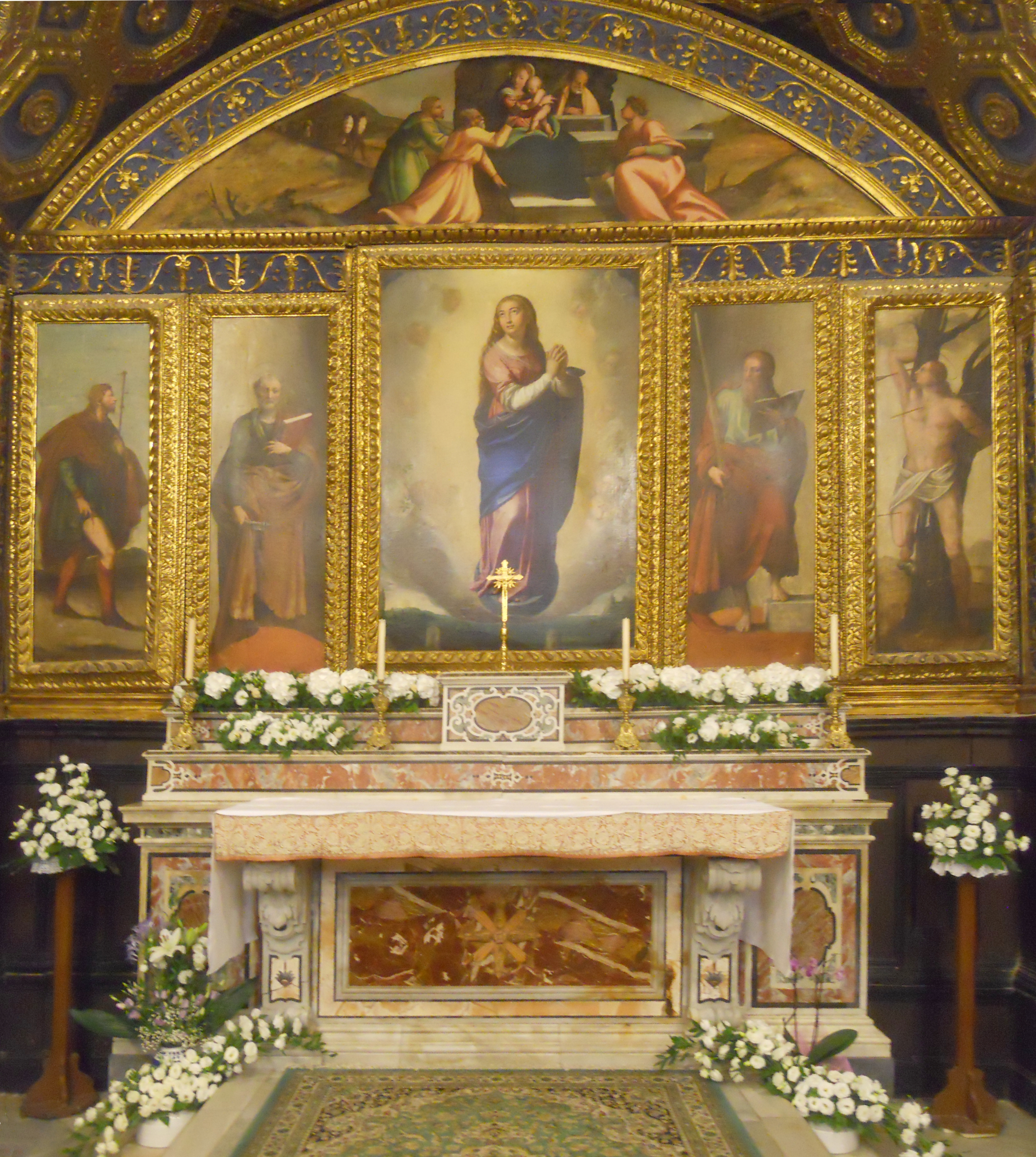 L'altare della Cappella d'Oro in Gaeta, con l'Immacolata Concezione di Scipione Pulzone.